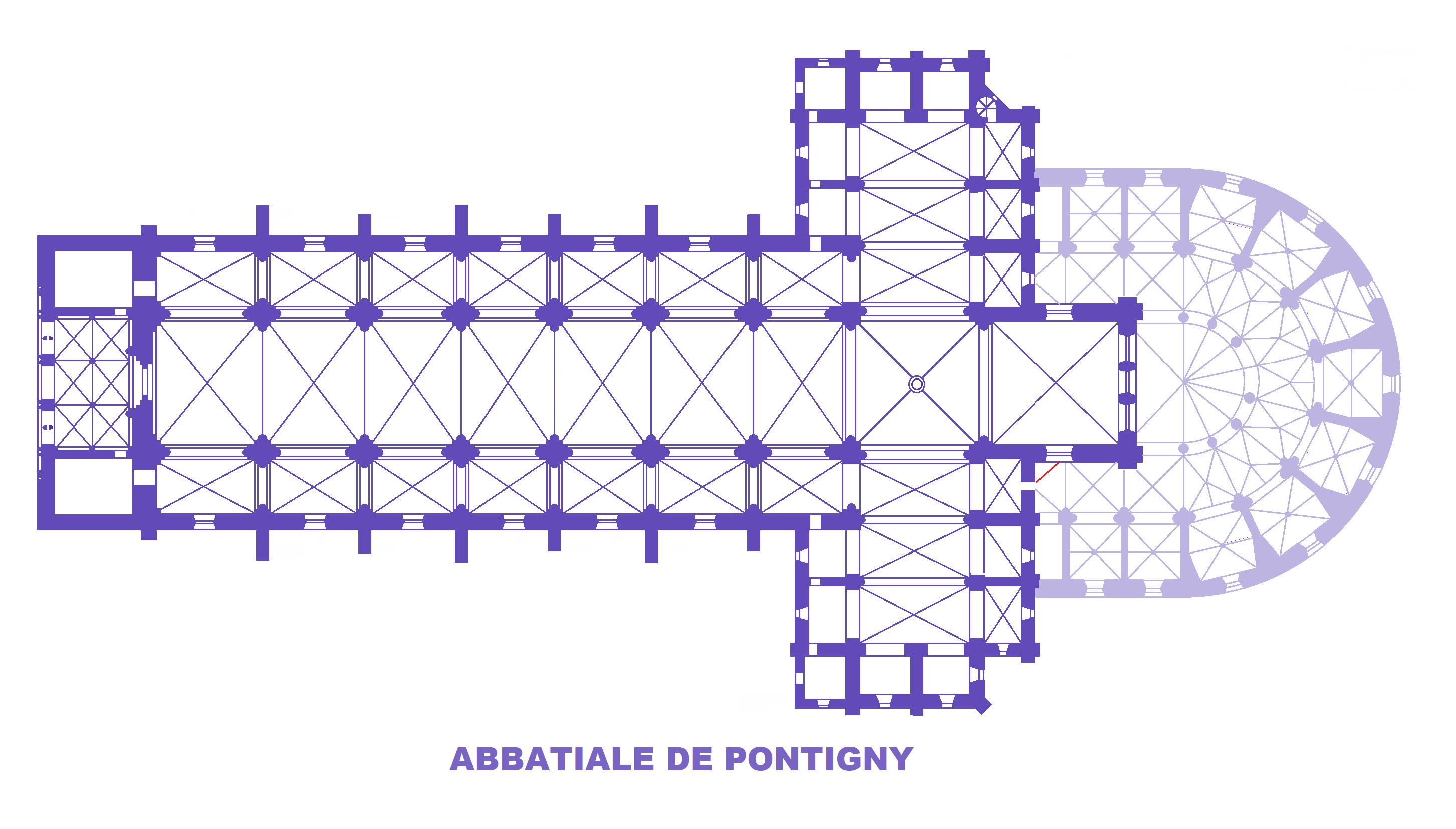 Abbatiale cistercienne de Pontigny, plan